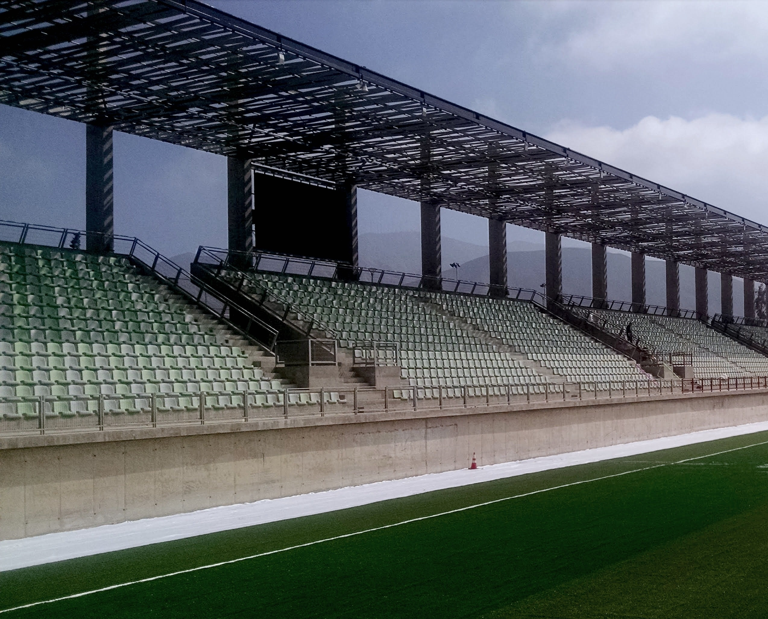 Gradas del Estadio Luis Valenzuela Hermosilla de Copiapó, Chile.